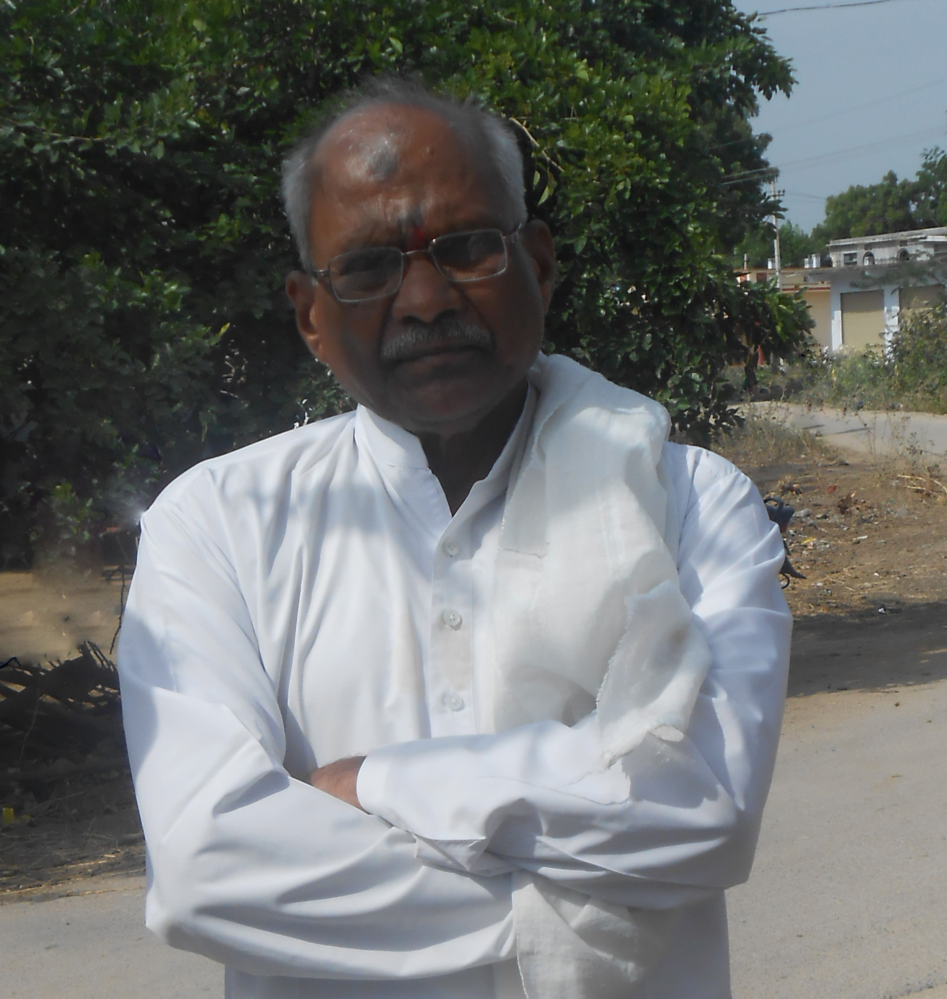 కూరెళ్ళ విఠలాచార్య